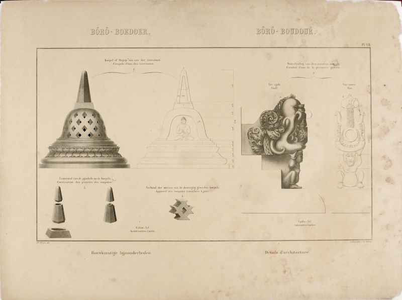 Litho. Deze prent is nummer 7. Deze prent is onderdeel van een serie van 355 litho's.. Bouwkunstige bijzonderheden van de Borobudur